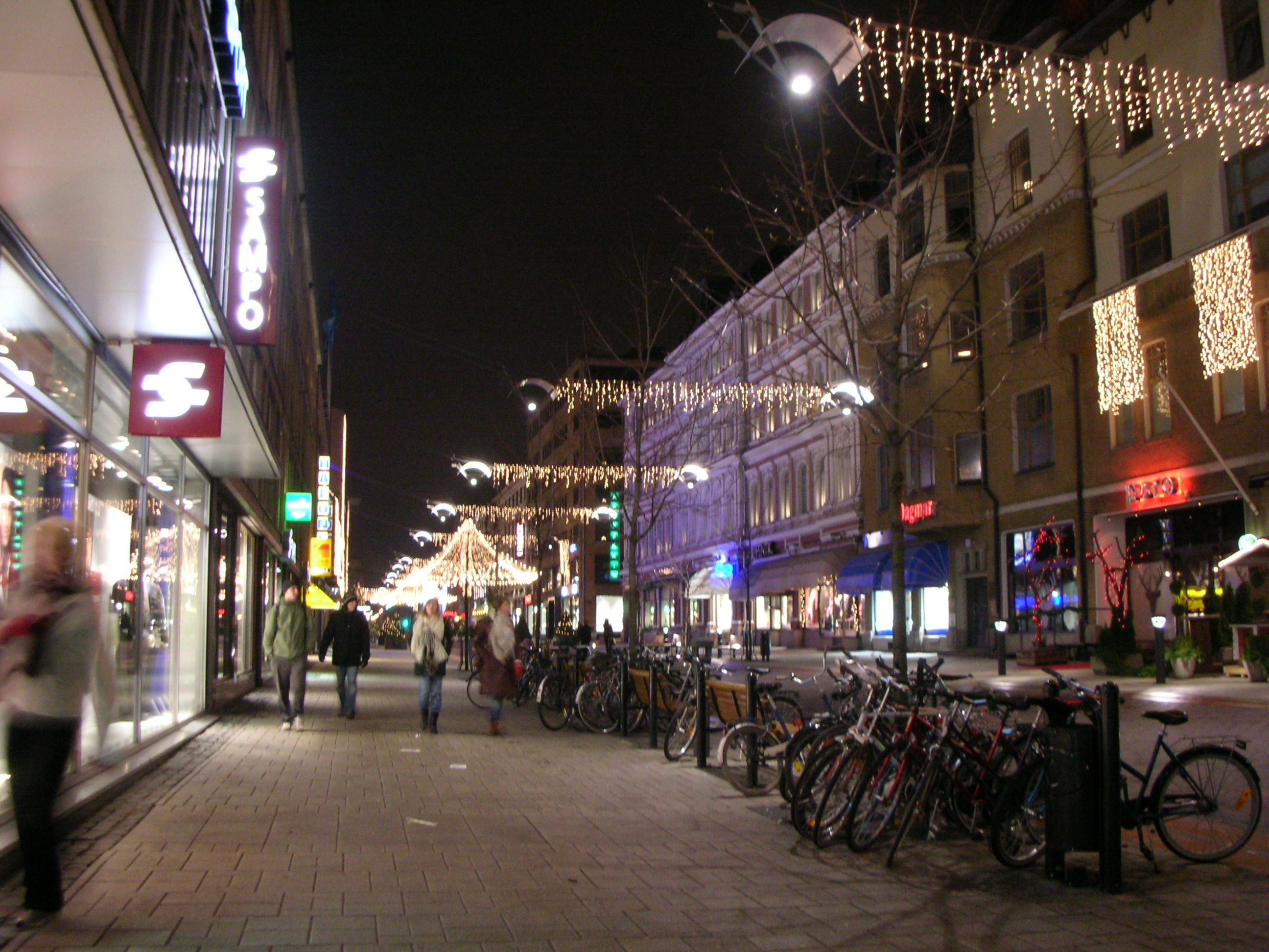 Pedestrian street in Turku, Finland, at night.